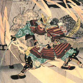 梧斎年英筆「今川義元 桶狭間大合戰之圖」、3枚揃錦絵、豊明市立図書館所蔵。